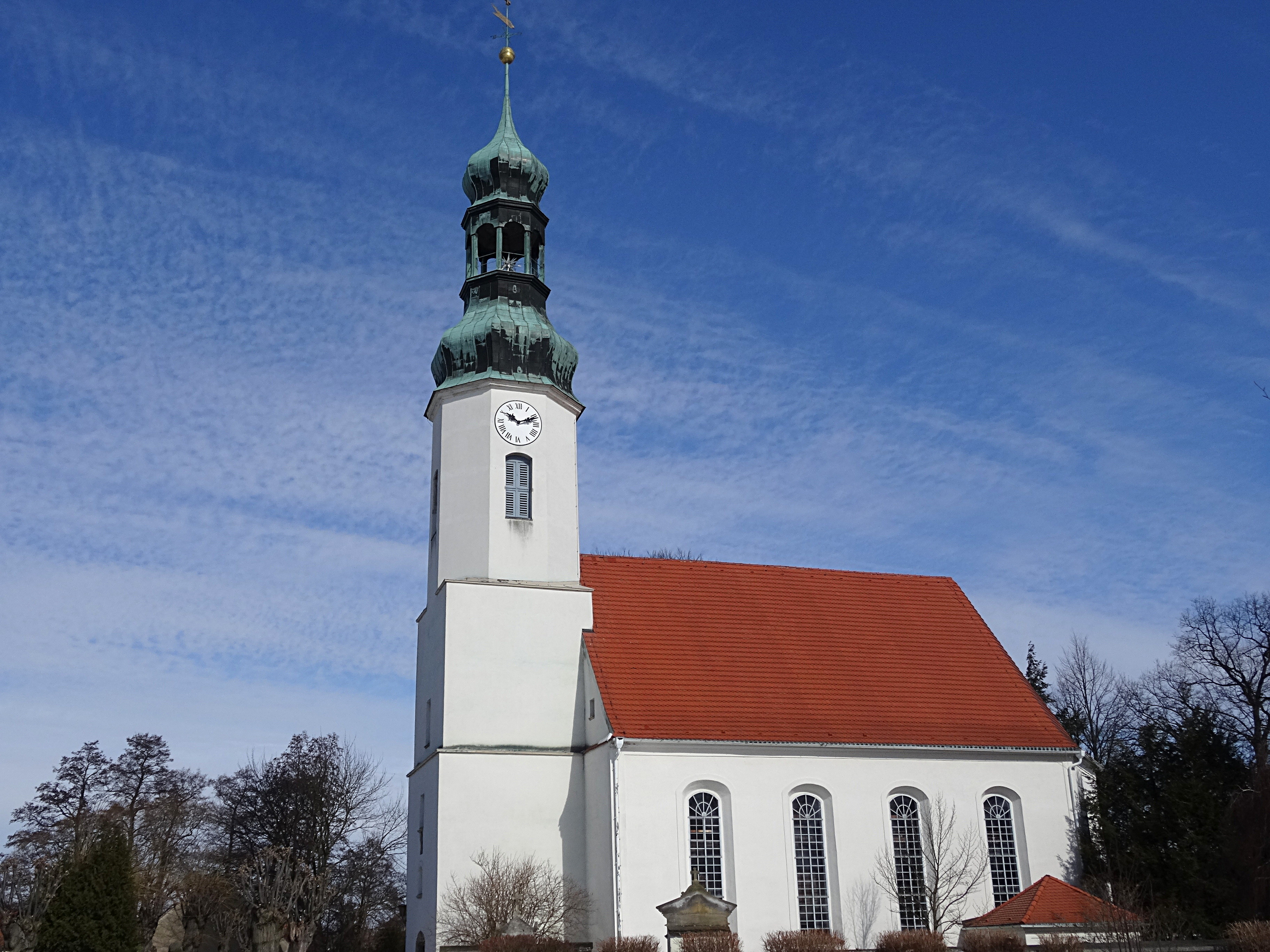 Oberseifersdorfer Kirche mit barocker Haube von 1820